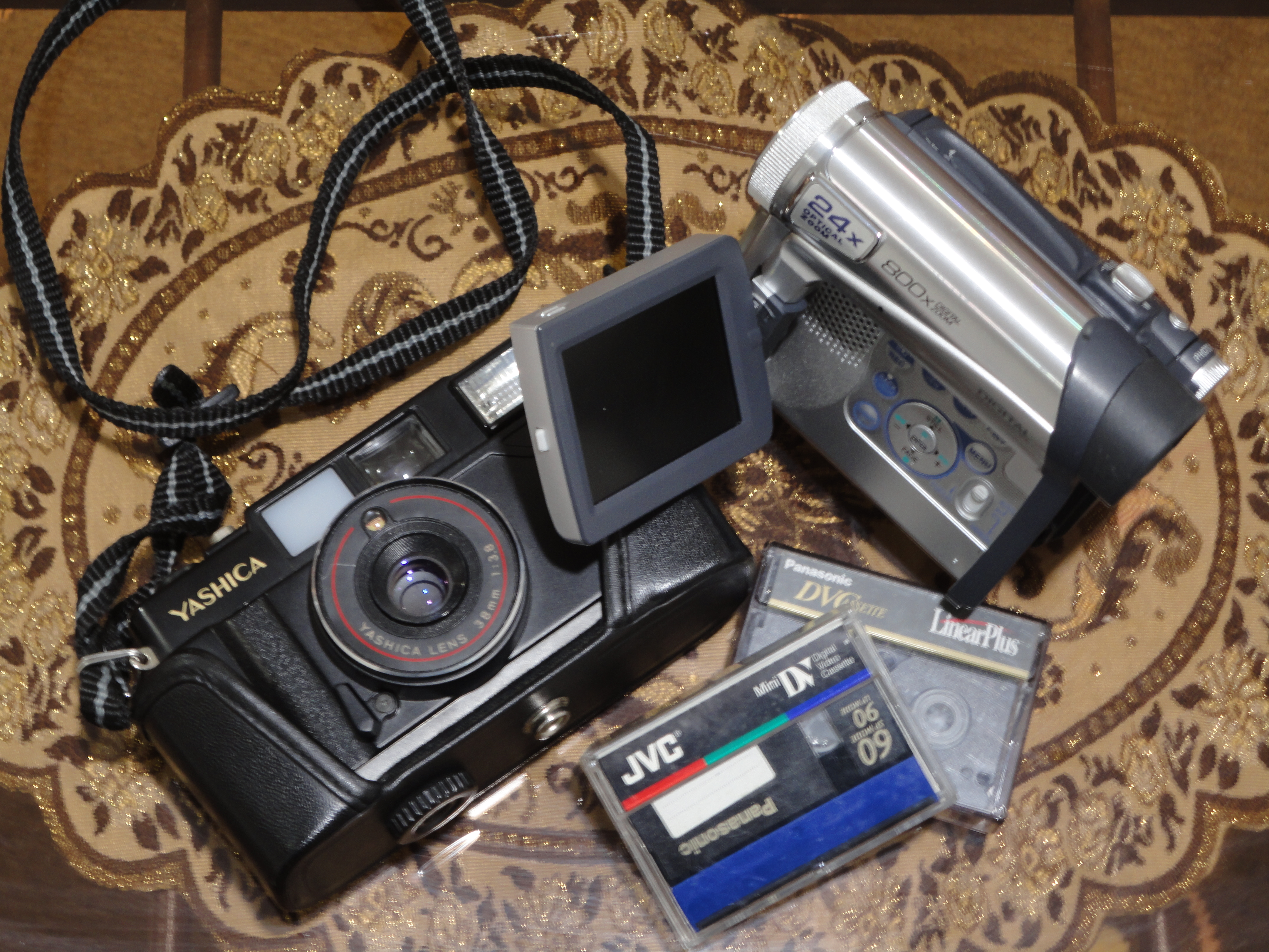 دو نوع دوربین اپتیکال که با داشتن فیلم کار می کنند عکس از قائمی